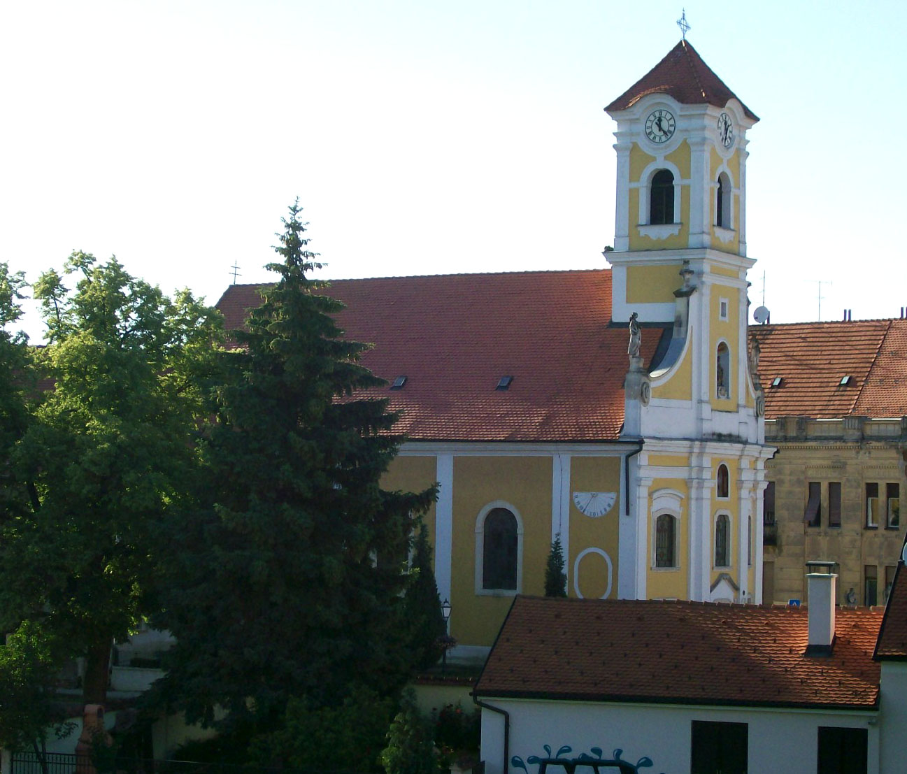 Crkva sv. Florijana u Varaždinu, pogled sa bedema Starog grada